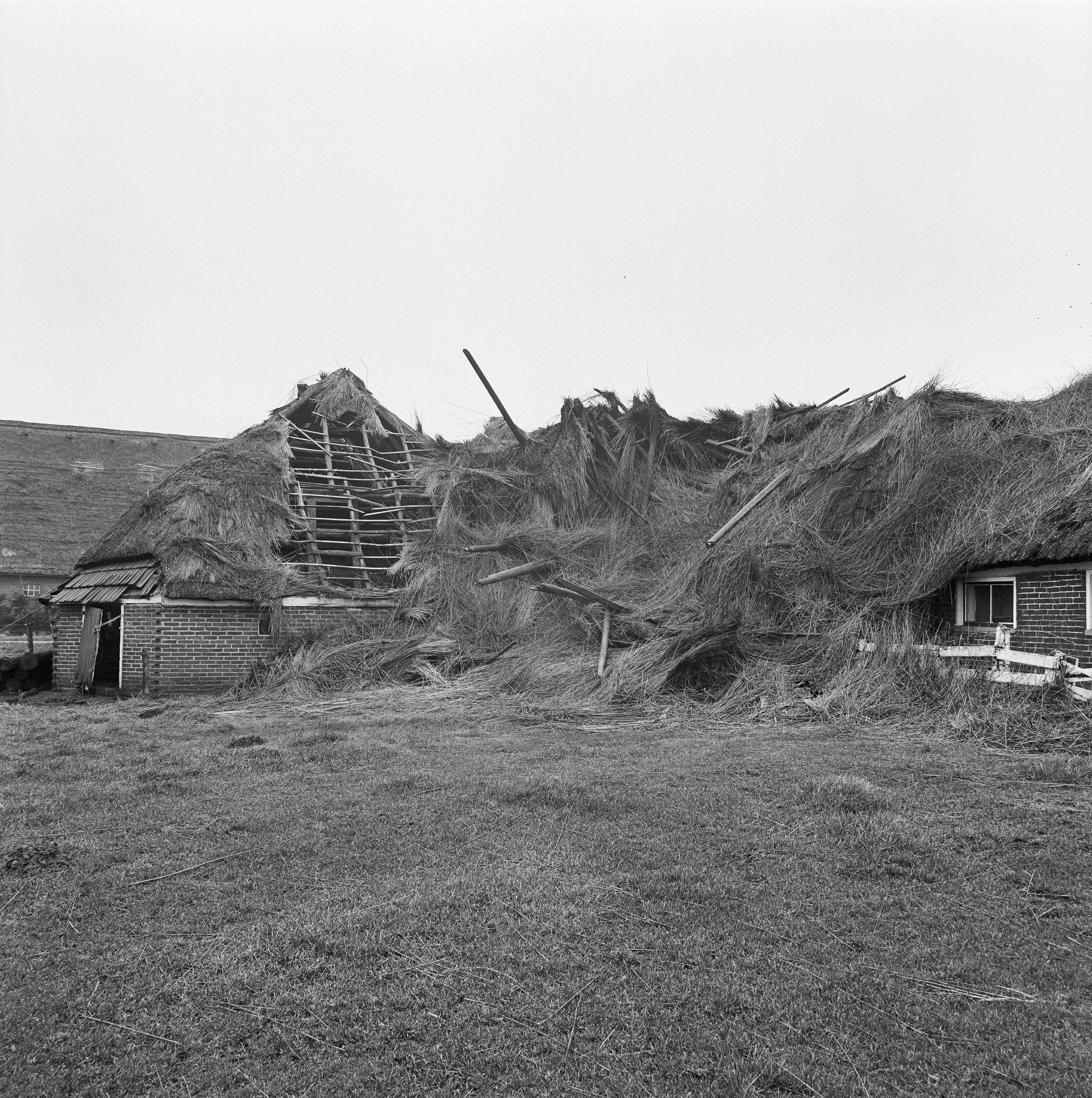 stormschade, zijaanzicht exterieur